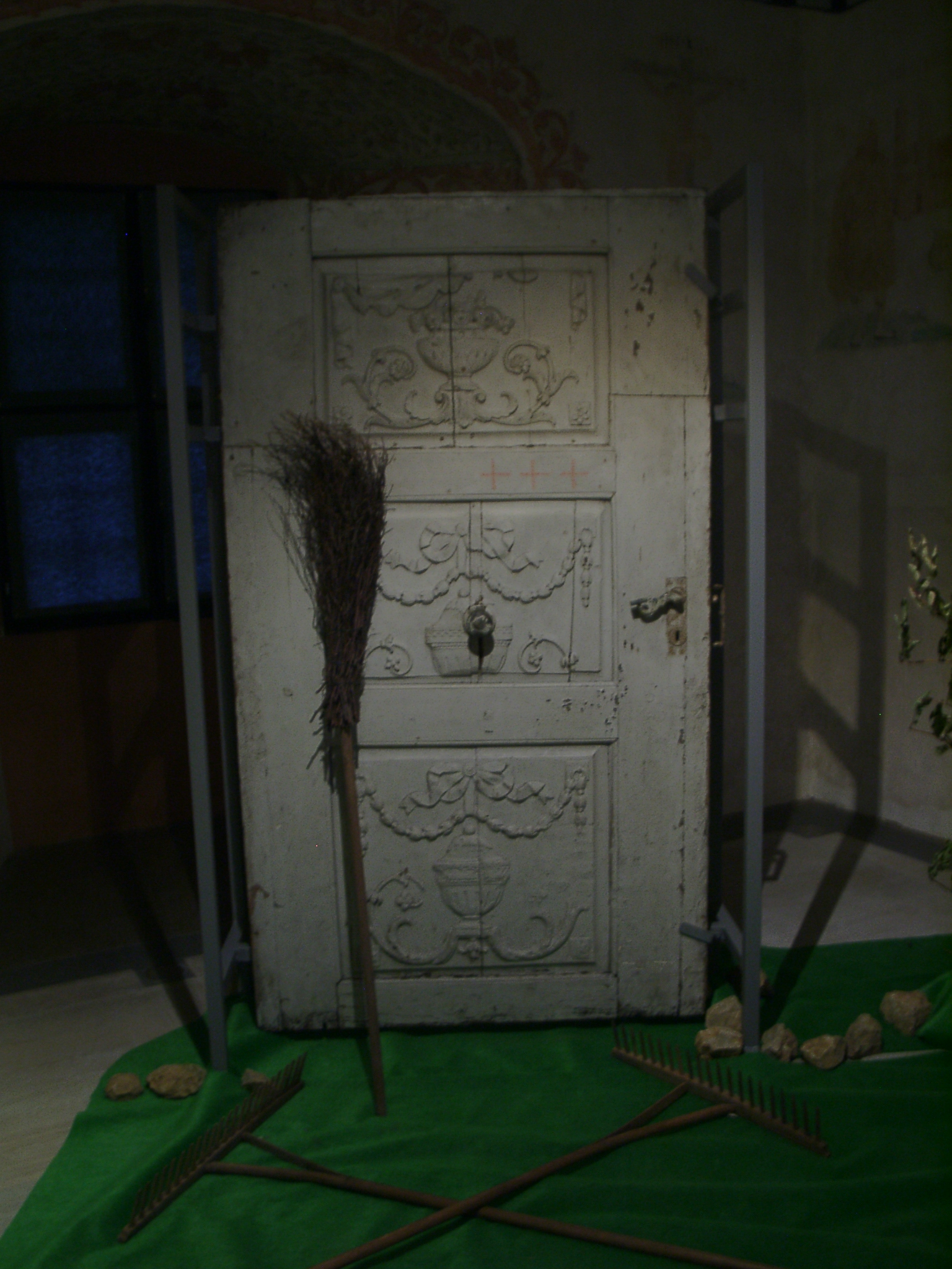 Hexenabwehr, Museum Forchheim